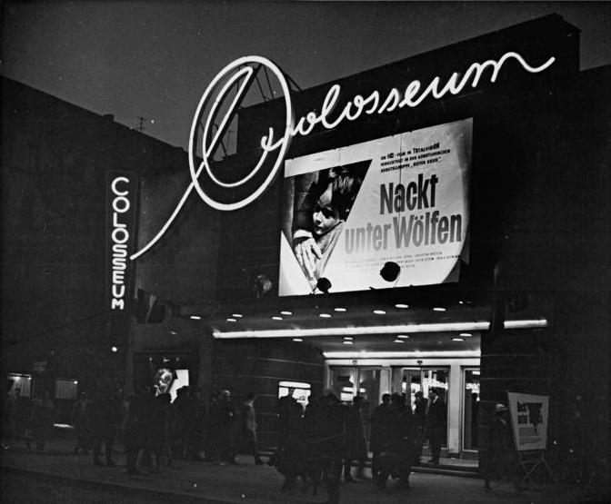 Berlin, Kino "Colosseum", Nacht Zentralbild Weiß Ge-Gro 11.4.1963 Weltpremiere von "Nackt unter Wölfen" im Berliner Filmtheater "Colosseum" Die Uraufführung des erschütternden Filmwerkes "Nackt unter Wölfen" nach dem gleichnamigen Buchenwaldroman von Bruno Apitz im Berliner Filmtheater "Colosseum" gestaltete sich am 10.4.63 - dem Vorabend des Tages, an dem sich vor 18 Jahren die Häftlinge des KZ Buchenwald selbst befreiten- zu einem kulturpolitischen Ereignis von internationaler Bedeutung. UBz: Blick auf das Colosseum